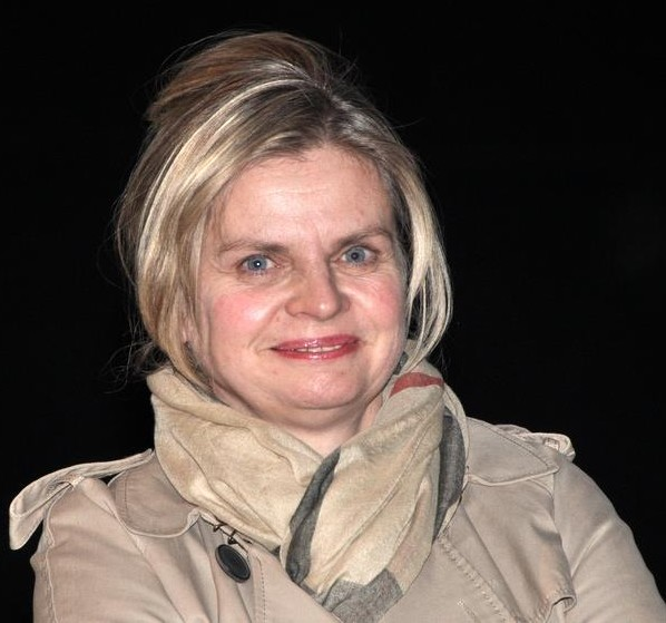 Isabelle Nanty à l'avant-première du film "Les Profs"